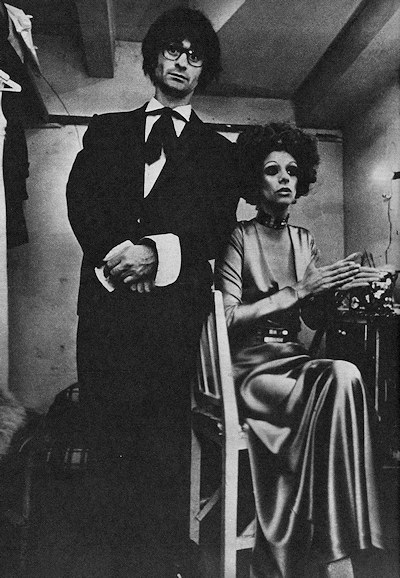 Nacha Guevara y Alberto Favero en 1970 para la revista Siete días ilustrados.